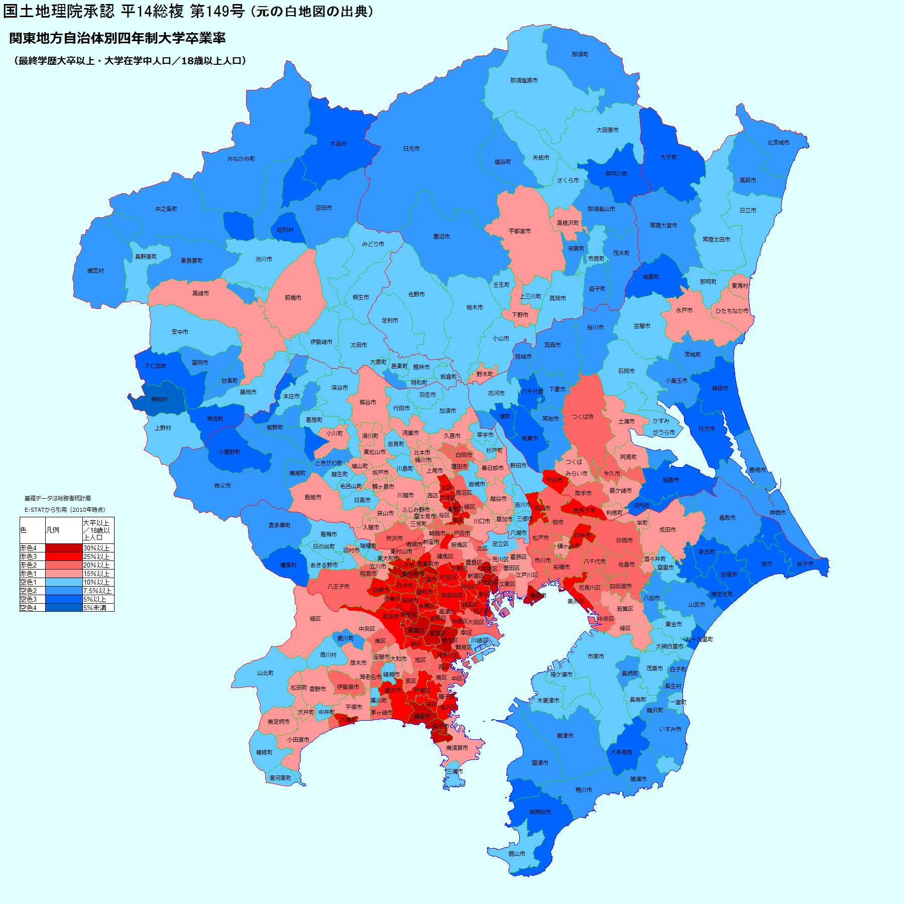 国土地理院の地図に、総務省統計局の統計データに基づき、投稿者が着色。